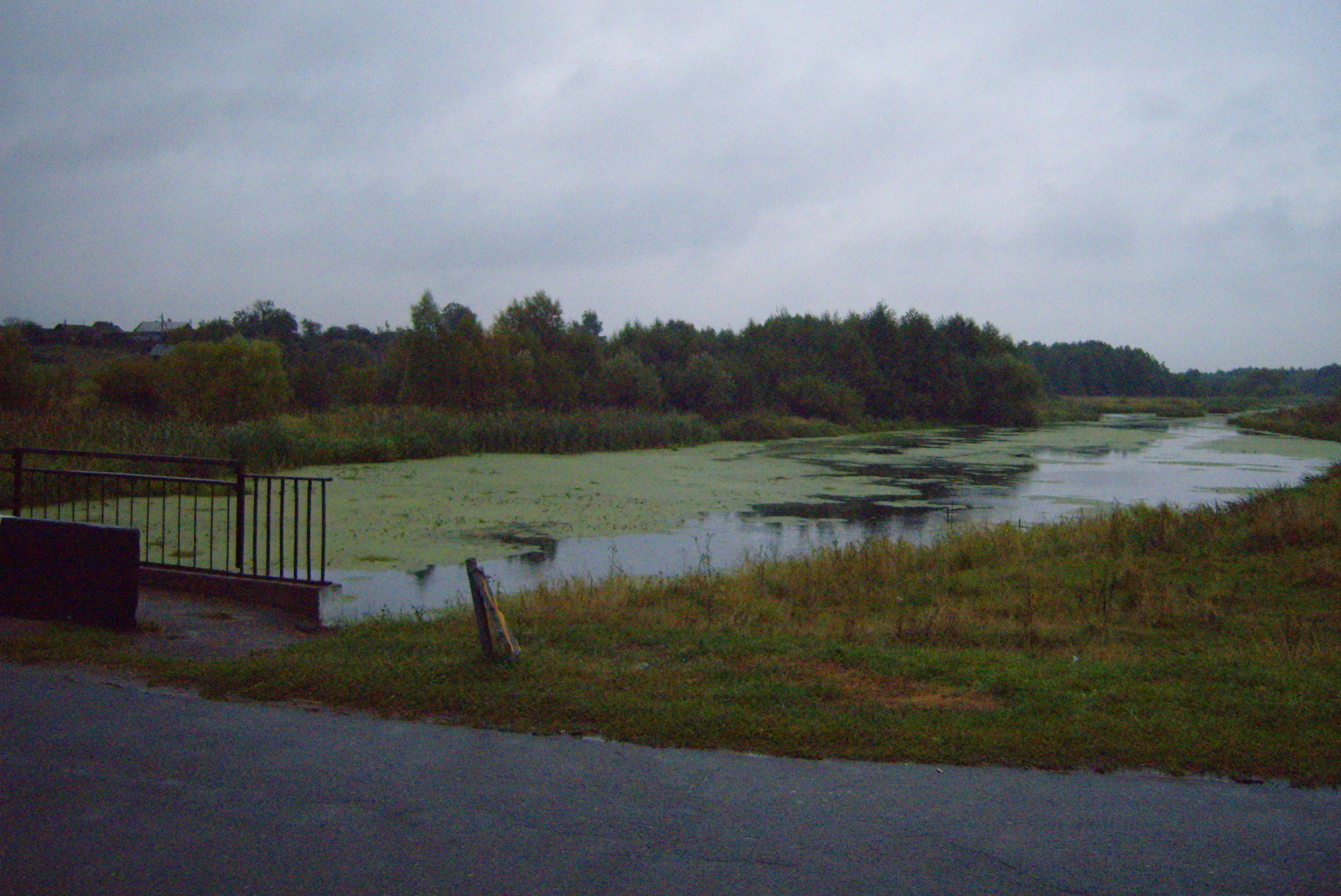 Река Мужанка в Миотче